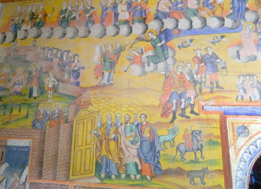 Фреска во црквата „Св. Ѓорѓи“ во прилепско Тројаци